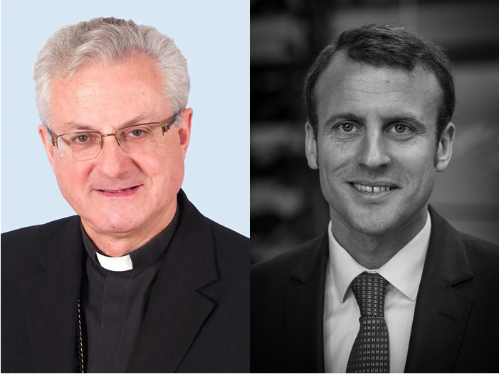 Photo des deux co-princes d'Andorre : Mgr Joan-Enric Vives i Sicília (depuis le 12 mai 2003) et le président français Emmanuel Macron (depuis le 14 mai 2017).